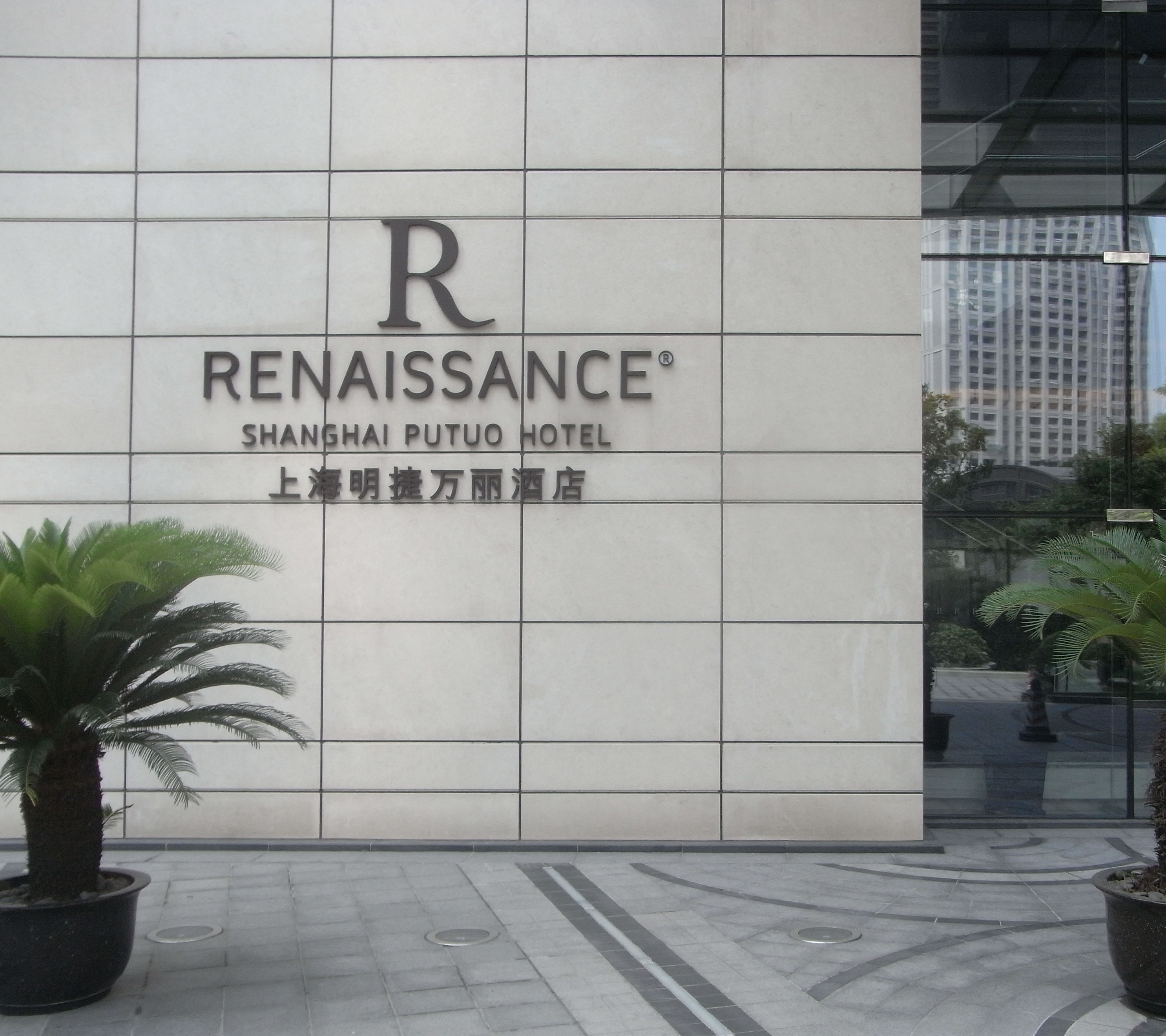 中文（香港）: 上海明捷萬麗酒店 Renaissance Shanghai Putuo Hotel, Shanghai, PRChina